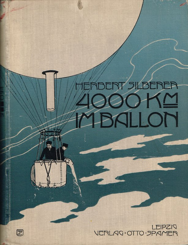 Herbert Silberer: Viertausend Kilometer im Ballon. Mit 28 photographischen Aufnahmen vom Ballon aus. Leipzig, Otto Spamer, 1903